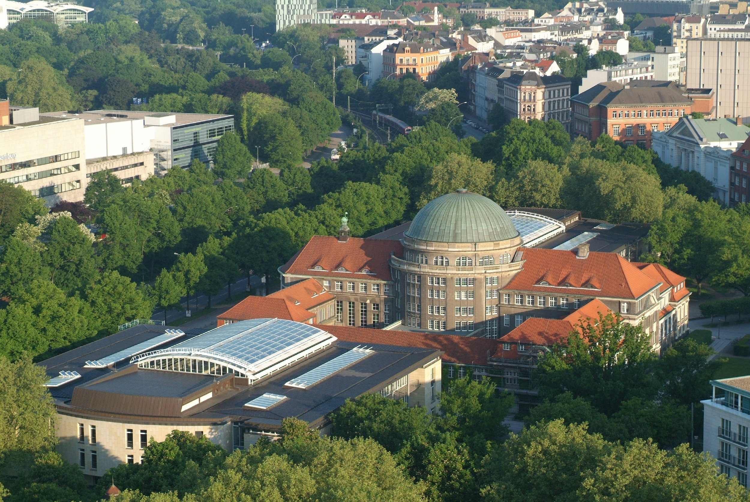 Projekt Heißluftballon. Universität Hamburg